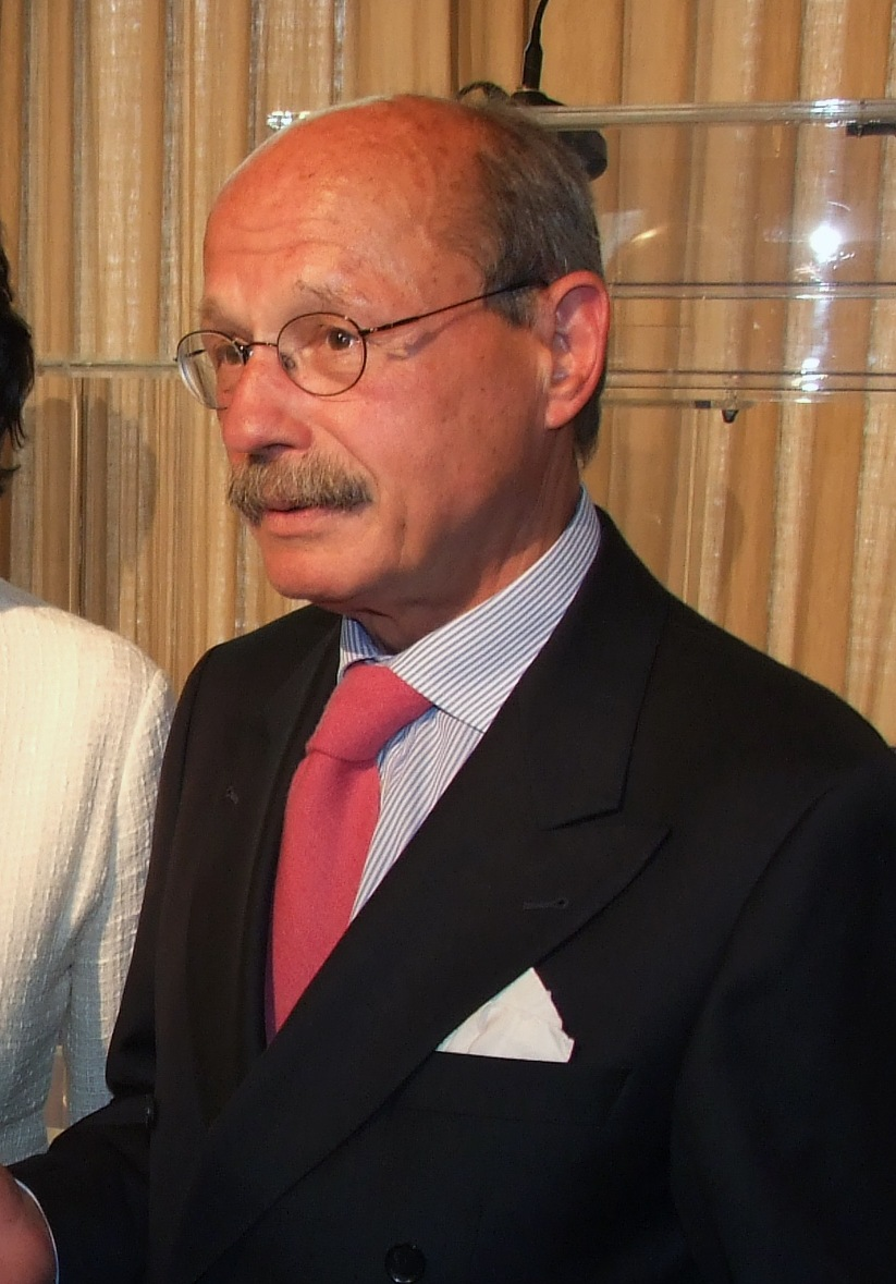 Dirk Sager bei der Verleihung der Karlsmedaille für europäische Medien 2009.